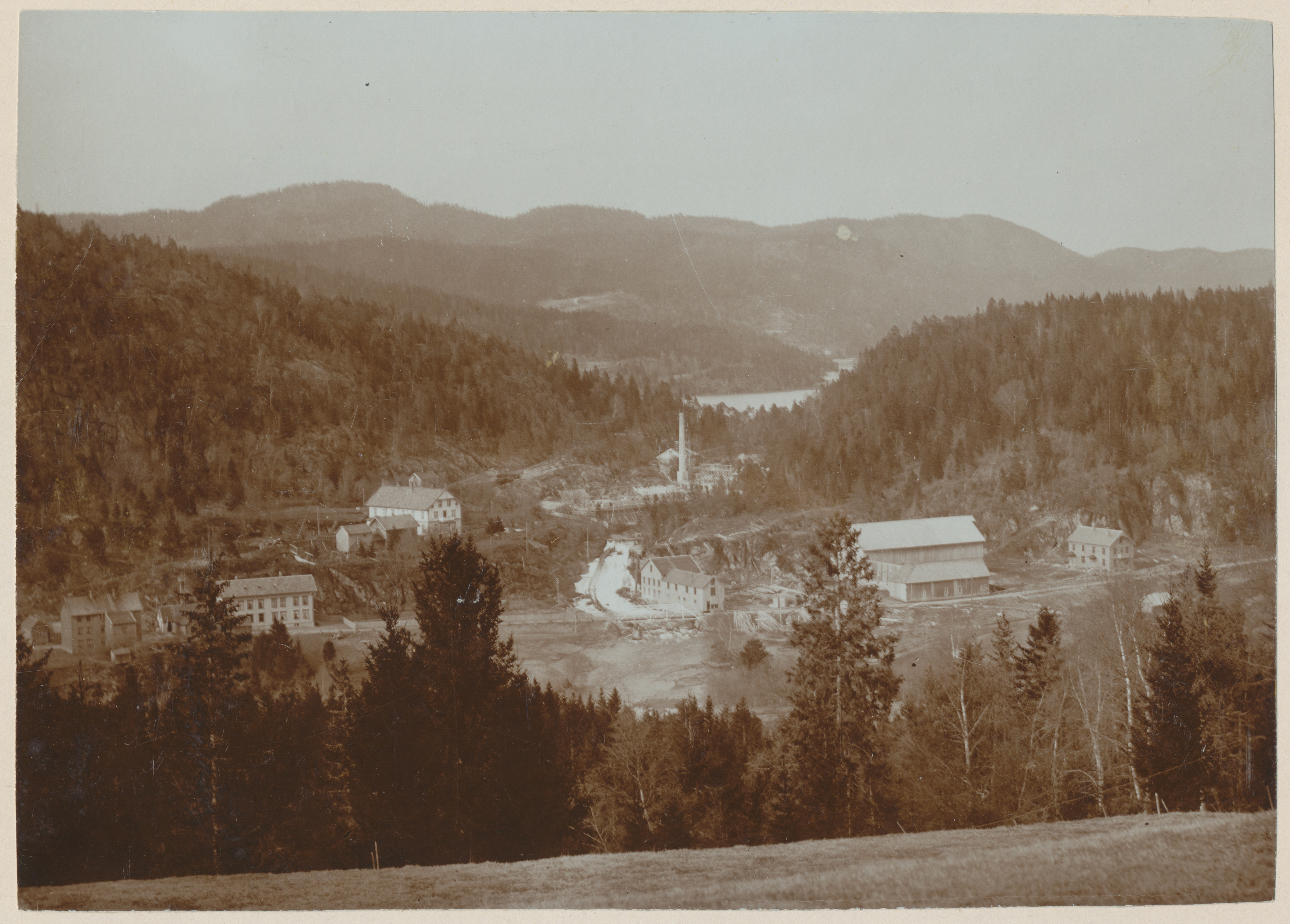 Hopla og Nydalen i Åsen, fotografert ca. 1913. Nede til høyre er gårdstunet i Hopla (227-1) med våningshus (t.v.) og mølle og sabruk (ved elva) oppført etter en brann i 1911. Foran fra venstre i bildet er arbeiderboligen Pikehjemmet og Butikklåna (nå Hopla vestre, 227-28). På skrå opp for Butikklåna ligger Hovedlåna (nå 227-51). Midt i bildet er tomta etter Nydalens fabrikker. Den gamle fabrikken brant i 1912. Ny fabrikkbygning ble oppført i 1914. På bildet har man kommet godt i gang med en del grunnarbeid. Fotograf / Photographer: Ukjent Fotoeier / Photo owner: Tore Haabeth Digitalisering / Digitizing: Arne Langås Foto-ID / Photo ID: 094-0005 Har du utfyllende opplysninger? Legg gjerne igjen en kommentar nedenfor eller send e-post til . | Do you have additional information? Please leave a comment below or send an e-mail to .